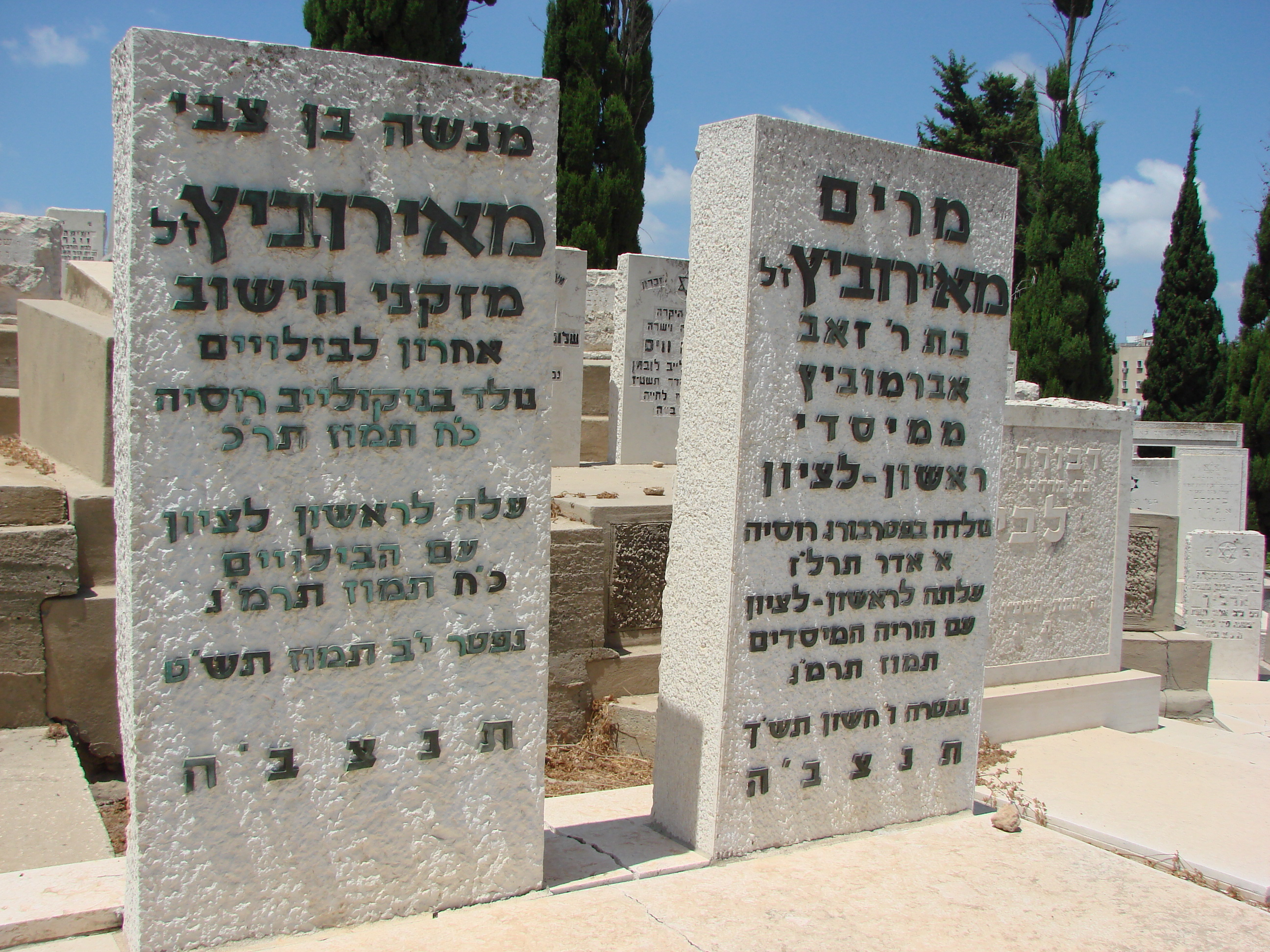 קברו של מנשה מאירוביץ ואשתו ברשל"צ